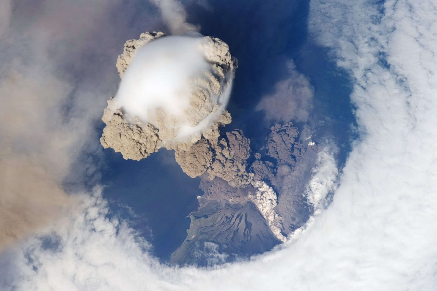 Извержение вулкана Сарычева 12.06.2009. Снимок с МКС